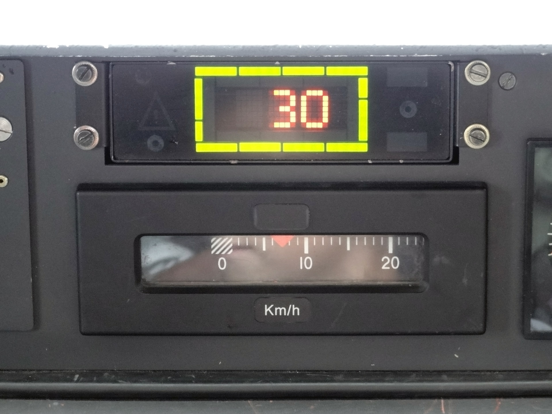 Indicateur SACEM. Pupitre de conduite d'un élément MI 2N à l'atelier de Sucy-en-Brie, Val-de-Marne, France.